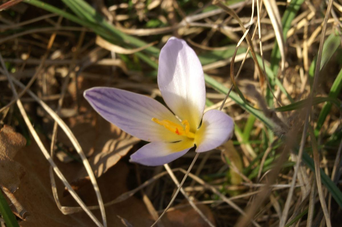 Progasti žafran v Pliskovici.